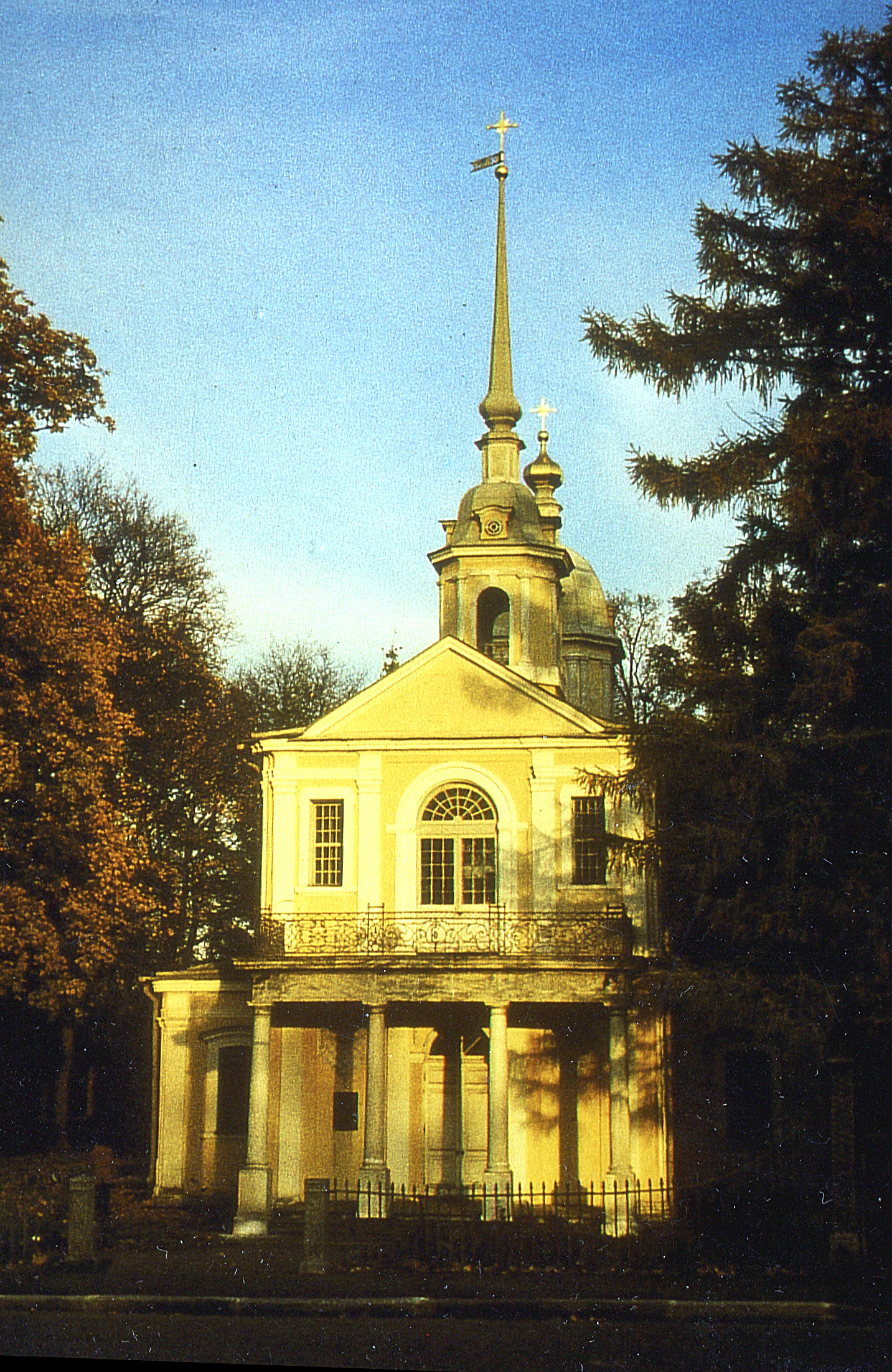 Церковь Знамение пресвятой Богородицы (1734-1738) в Лицейском саду.